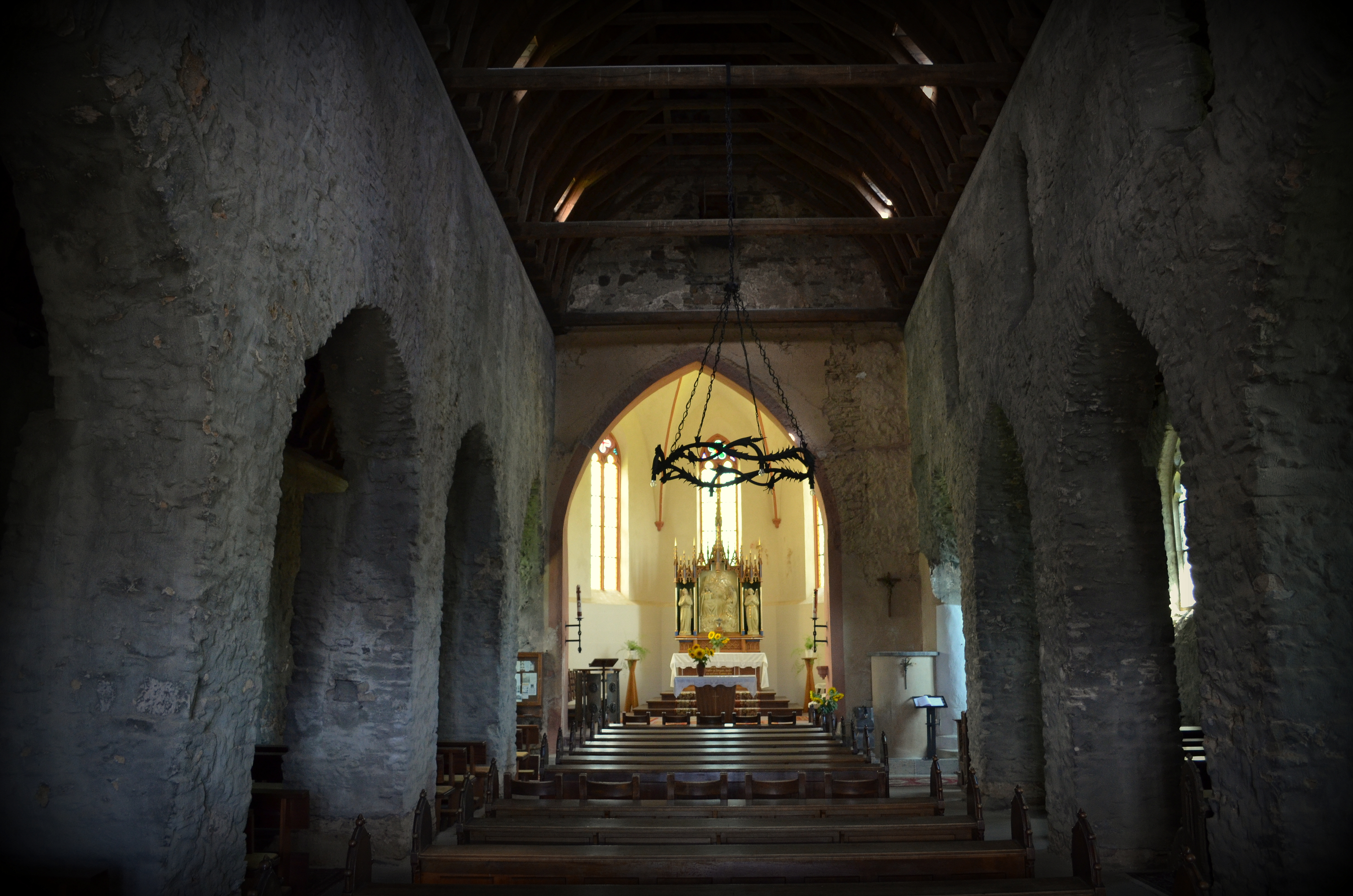 Oberfell, Bleidenbergkapel van de Hl. Drievuldigheid, interieur